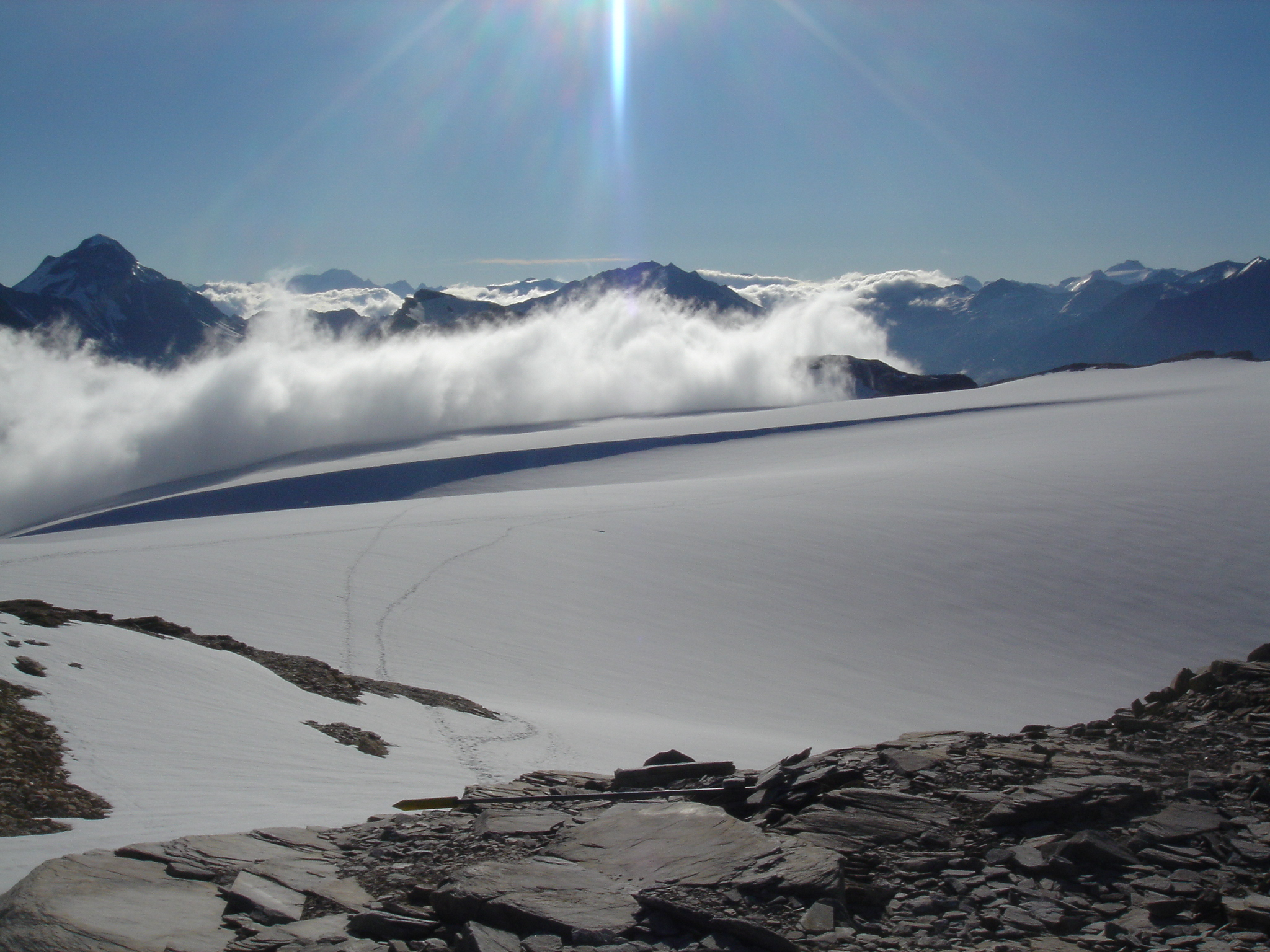 Glaciers de la Vanoise depuis la pointe du Dard (3206m).